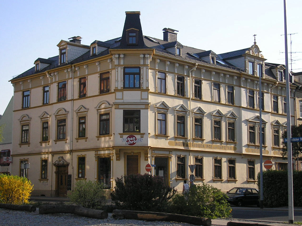 Ein Haus in der Ilmenauer Altstadt.